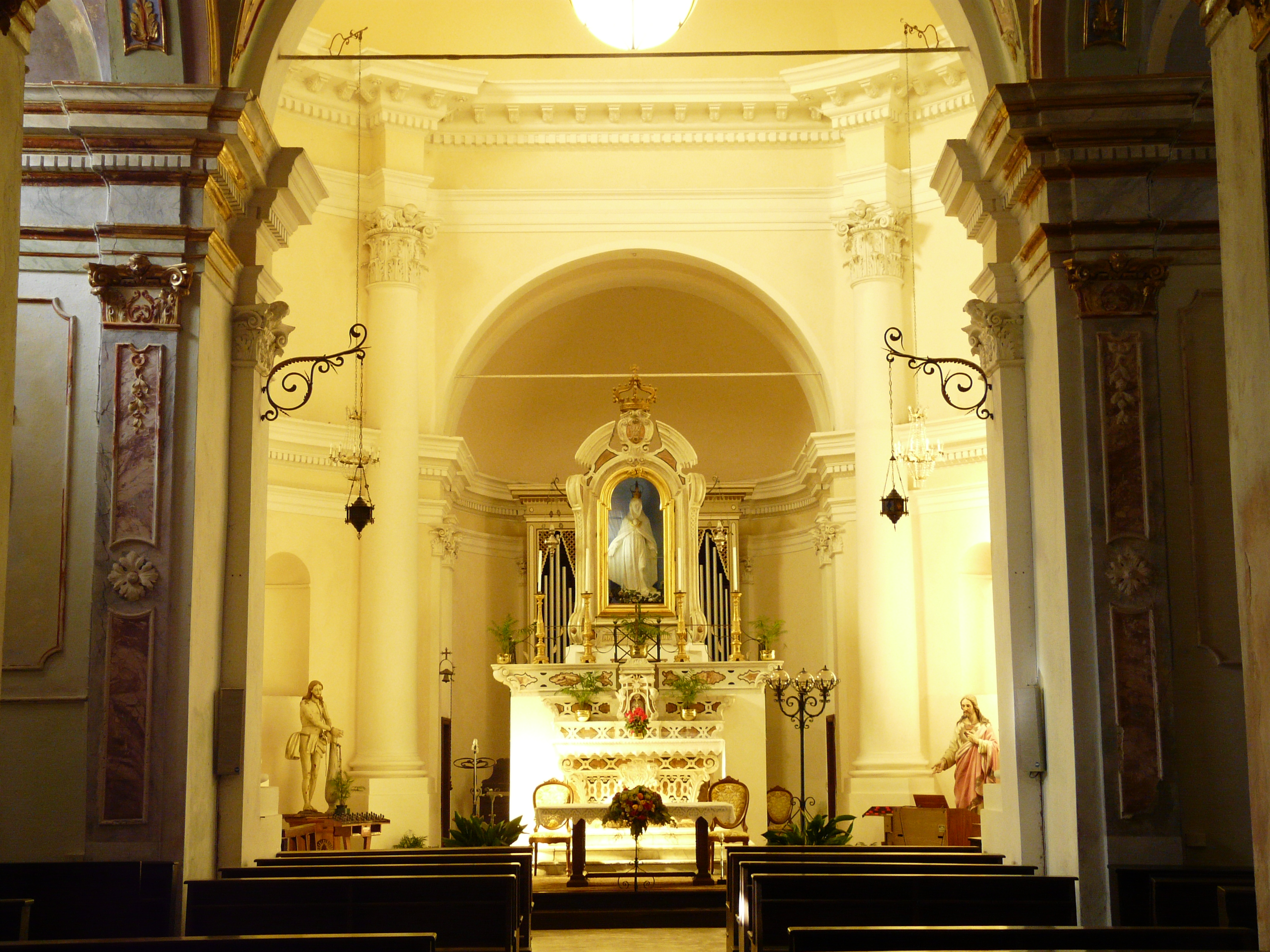 Santuario di Nostra Signora della Misericordia, Mallare, Liguria, Italia